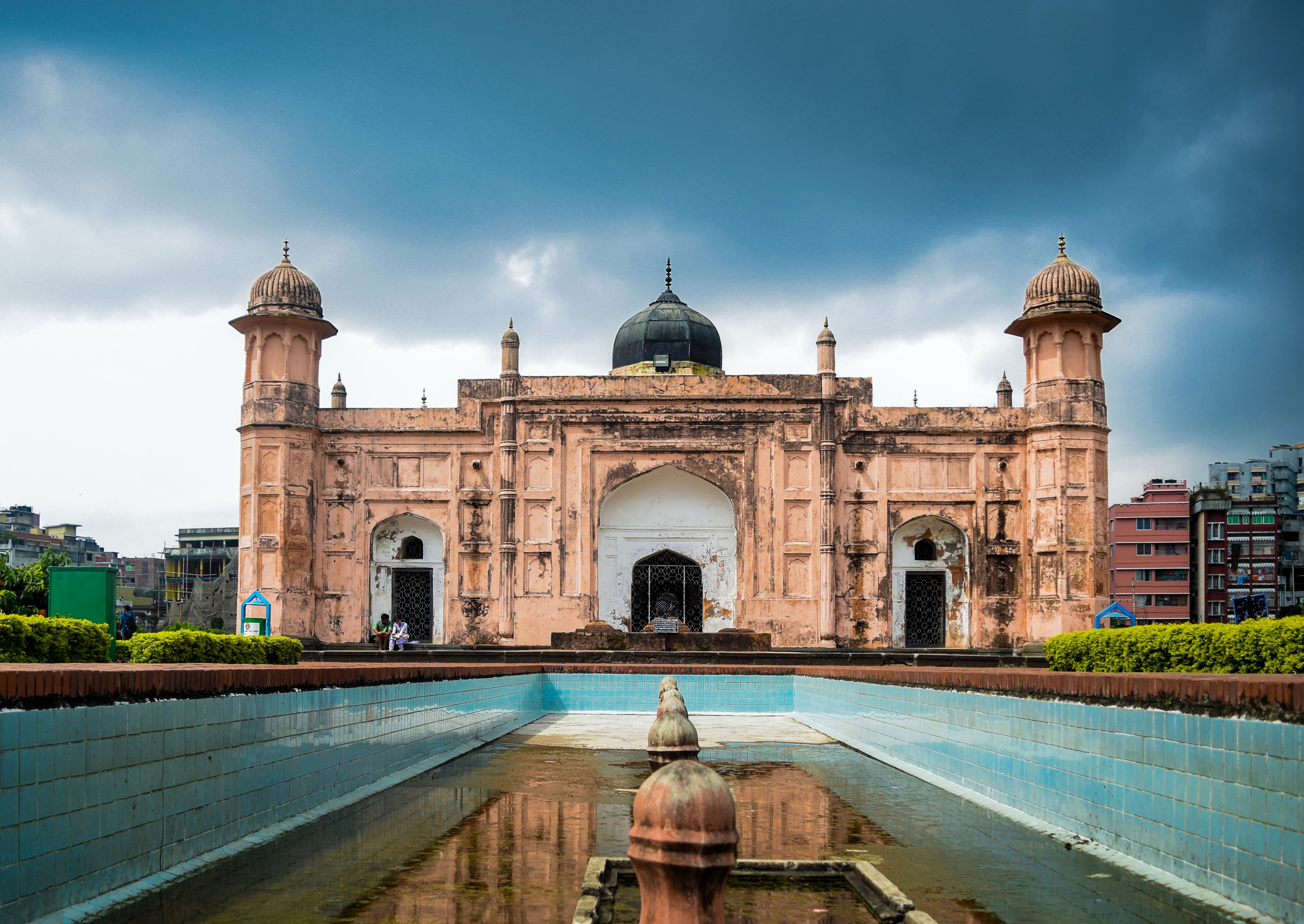 পরিবিবির মাজার